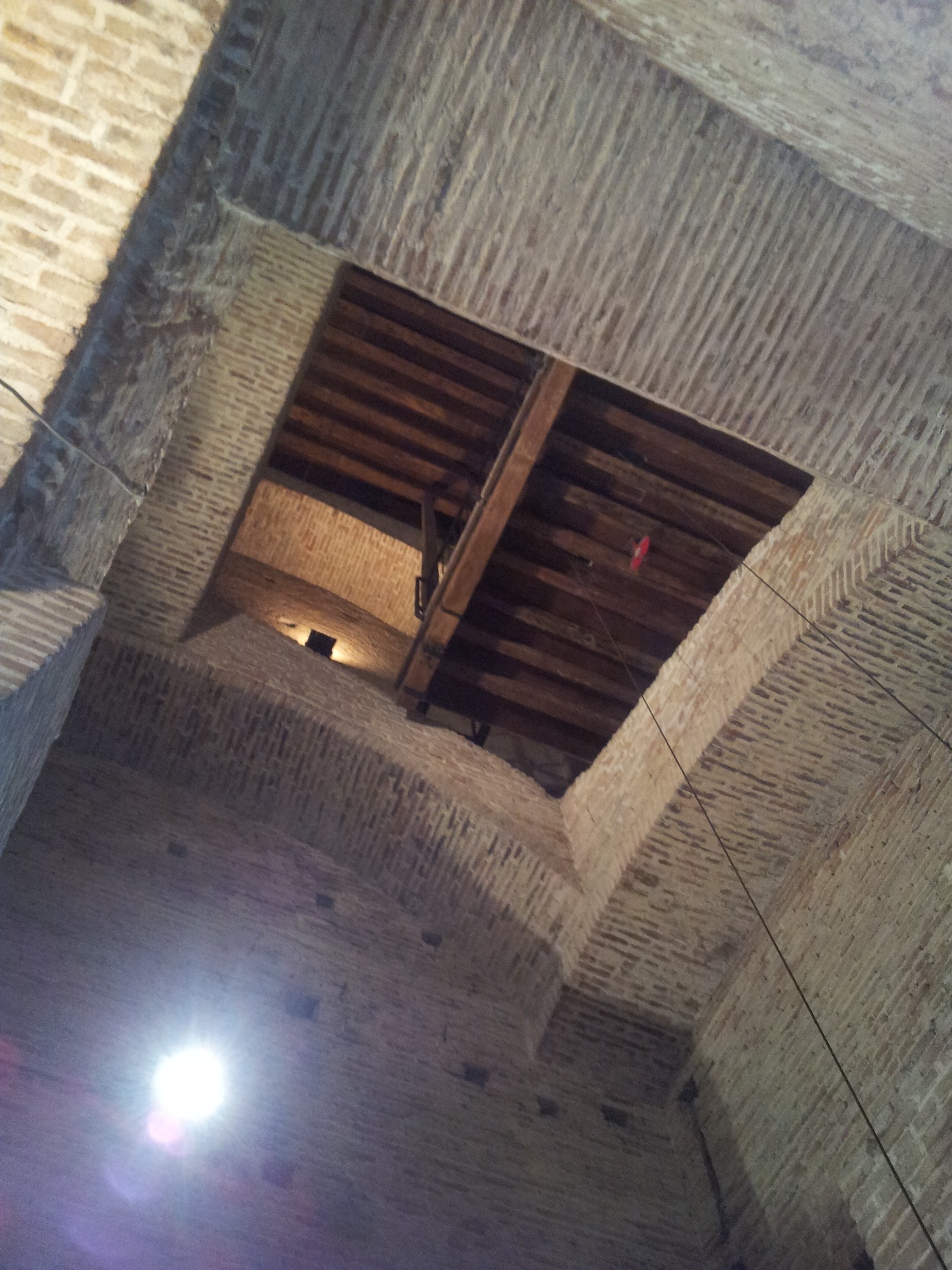 Vista interna del campanile del Duomo di Piove di Sacco